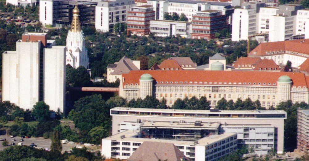 Leipzig, German Library